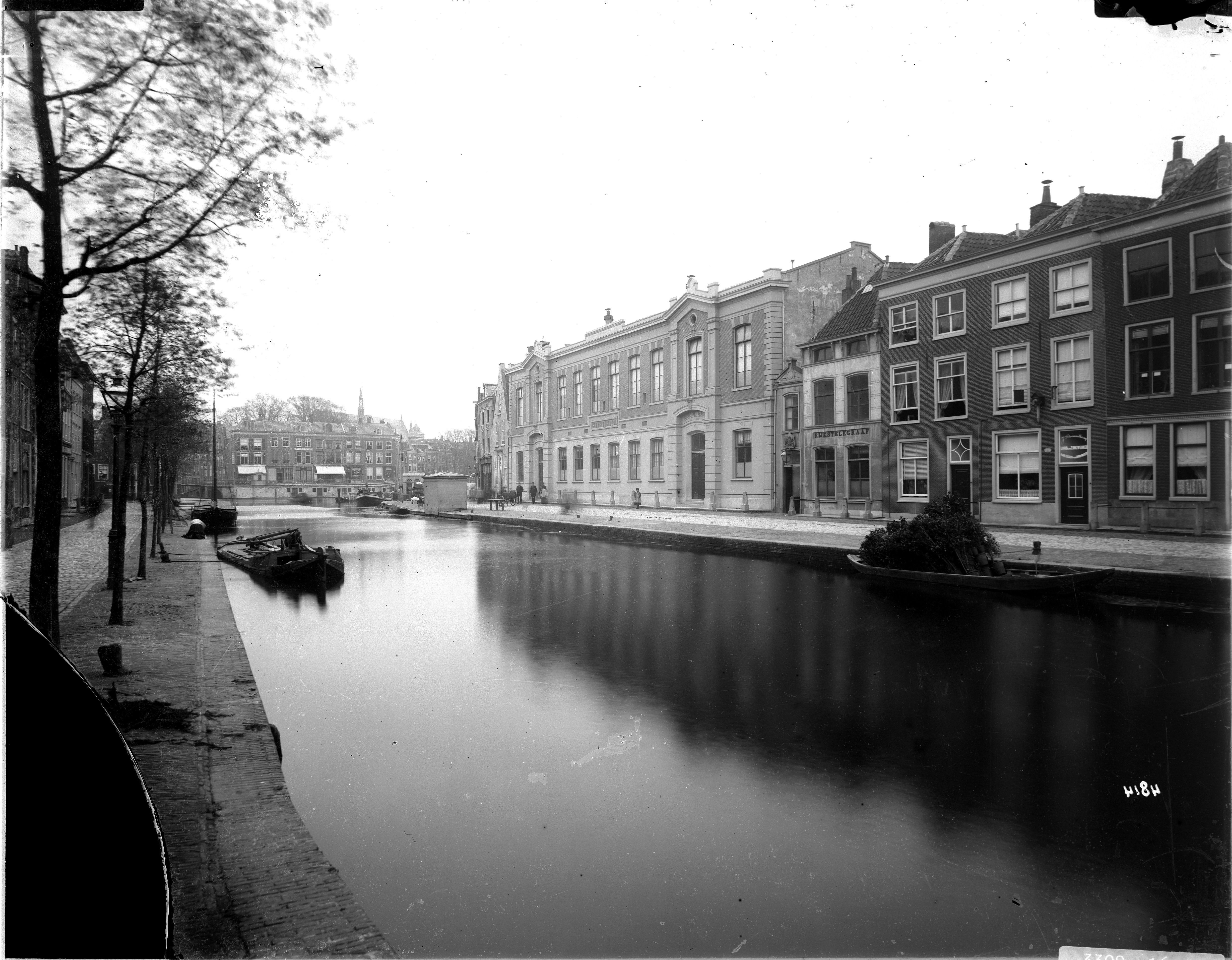 Aalmarkt gezien van de Kippenbrug. Rechts de Gemeente School van 1861, op de achtergrond de Hoogstraat.